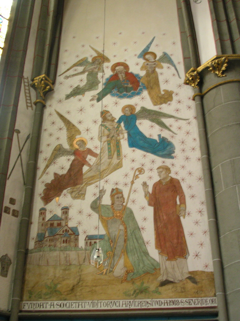 Ahrweiler, katholische Pfarrkirche St. Laurentius Erhebung des Hl. Martin in den Himmel, rechts der Trierer Dom, daneben Hl. Severin.